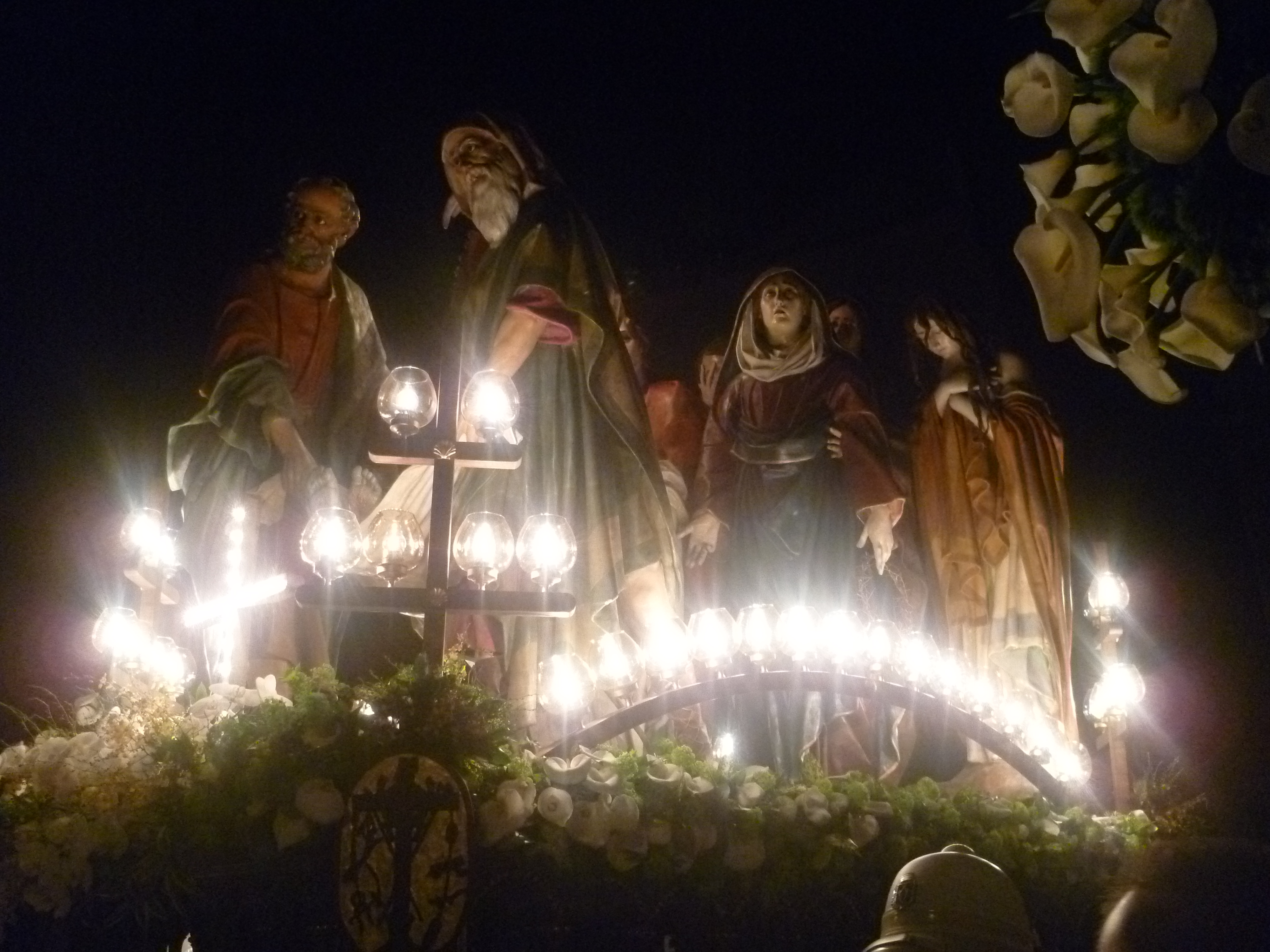 Processione degli Otto Santi, Ruvo di Puglia